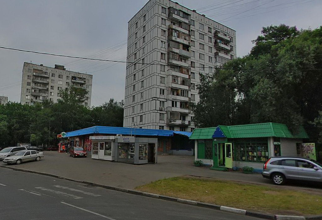 Клязьминская улица в 2010 году.